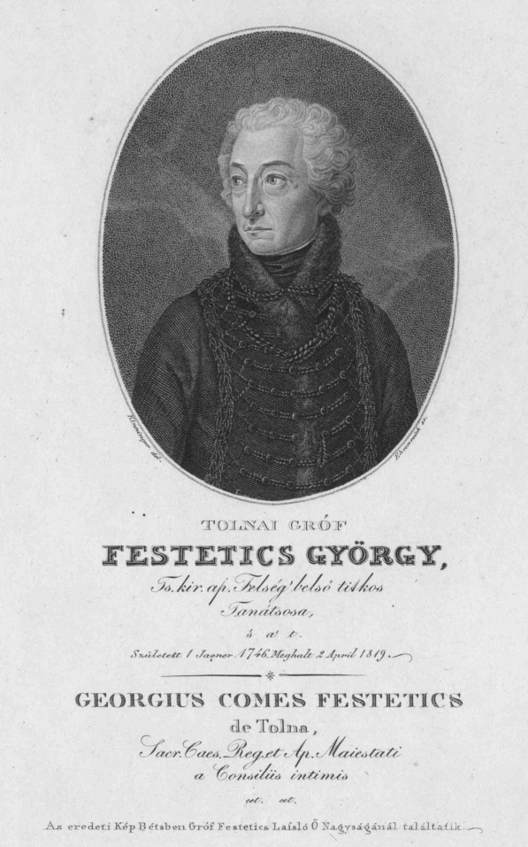 Gróf tolnai Festetics György (Ság, 1755. január 1. – Keszthely, 1819. április 2.) a keszthelyi Georgikon alapítója, gróf Festetics Pál kamarai alelnök és Bossányi Júlia grófnő fia, gróf Festetics László apja, gróf Széchényi Ferenc sógora.